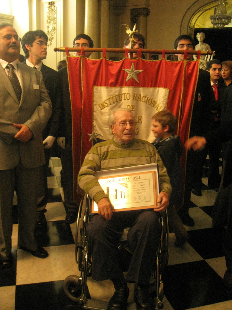 Arquitecto partícipe en la construcción del actual edificio del Instituto Nacional, homenajeado en la ceremonia